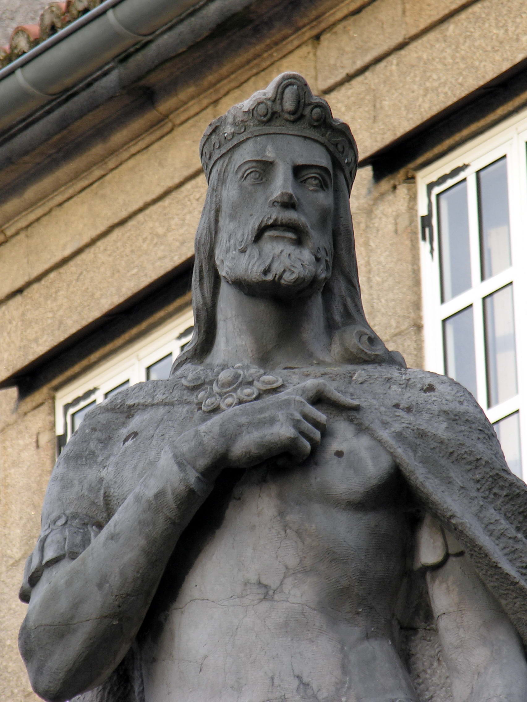 Afonso II o Casto, primeiro rei que peregrinou a Santiago de Compostela. Estatua exterior na Zona vella de Santiago de Compostela.